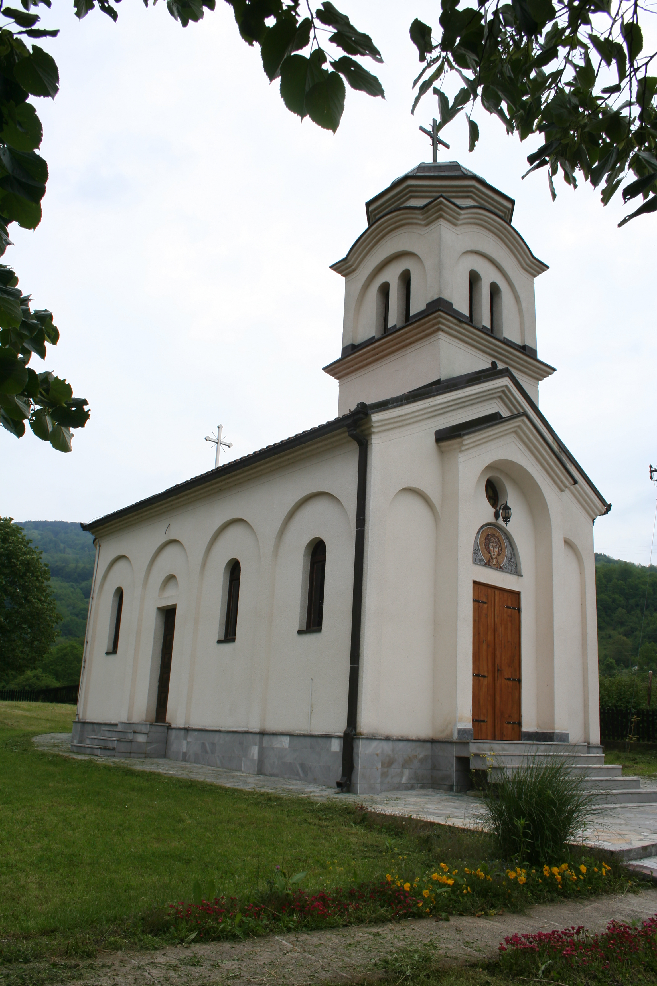 Crkva Sv. Pantelejmona, Crvice